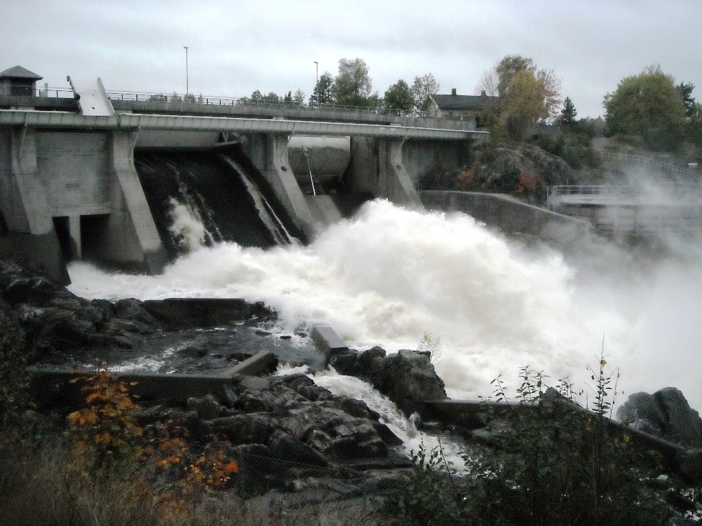 Rygenefossen på Rygene i Arendal